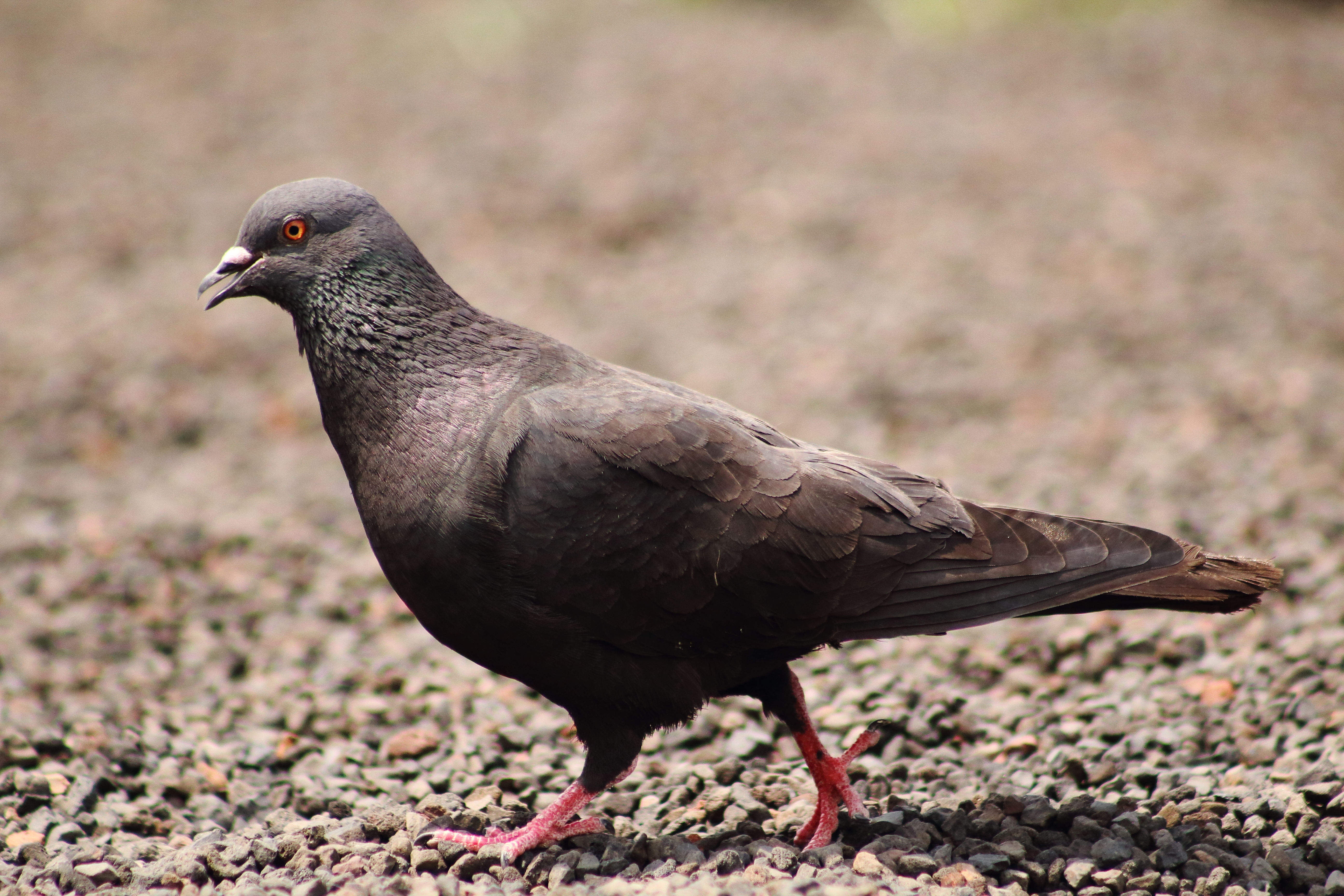 Perfil de una paloma.